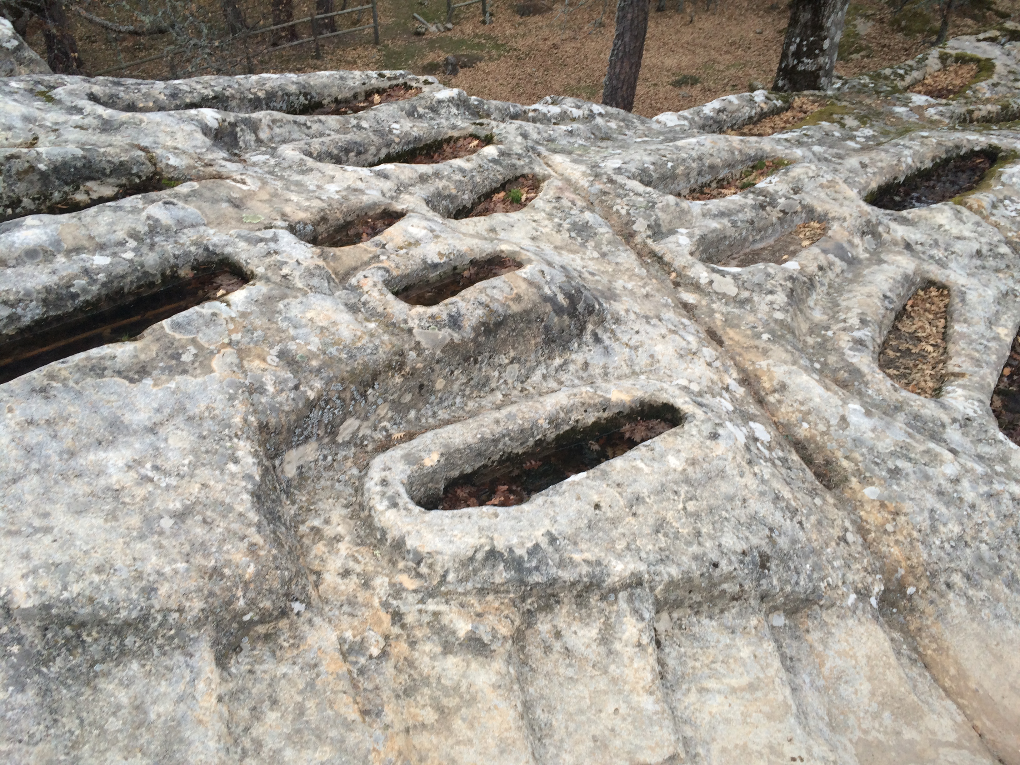 Algunas más tumbas